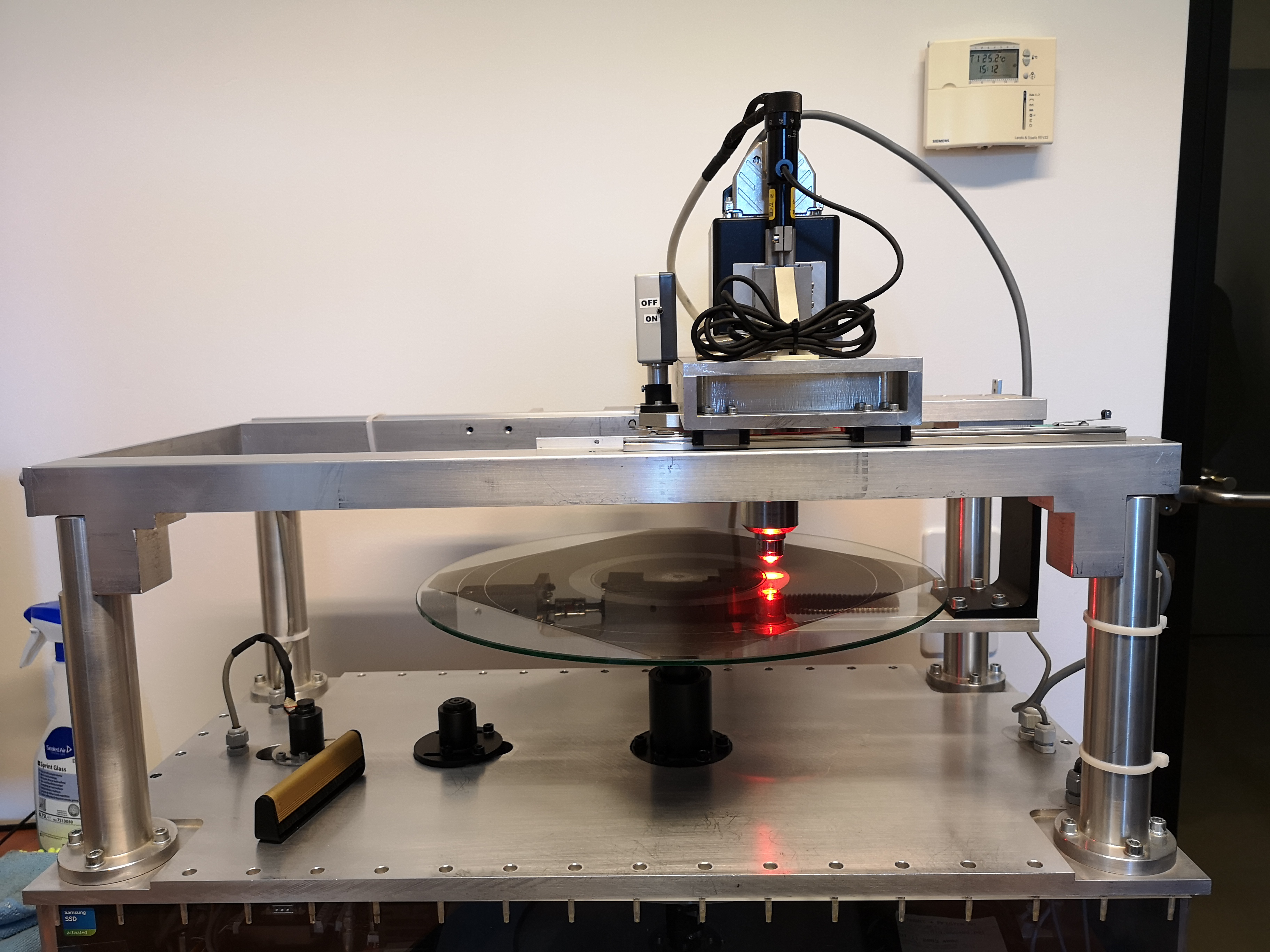 Maschine zur Rettung und Digitalisierung von Audio auf Vinylplatten in der Schweizerischen Nationalphonothek